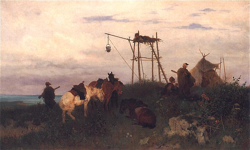 Сторожа над Дніпром